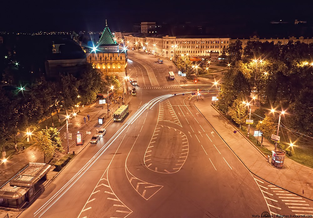 Площадь Минина и Пожарского ночью